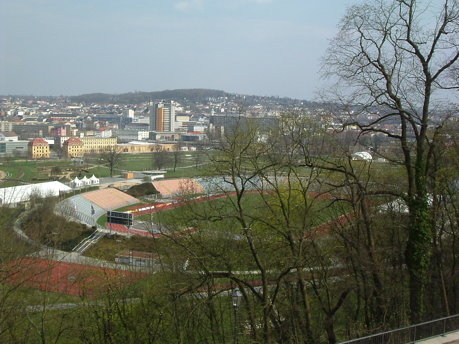 Stadion der Freundschaft, Gera